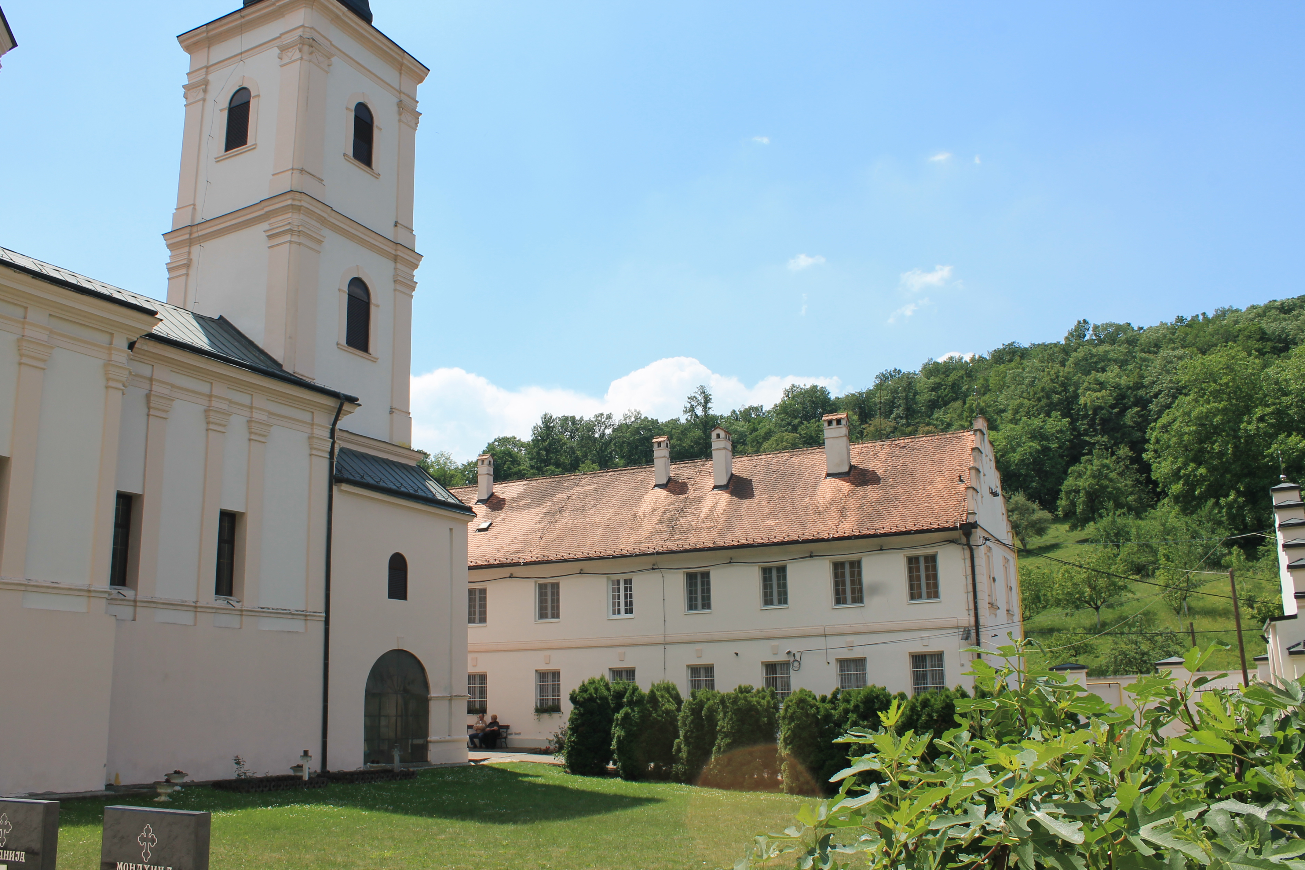 Manastir Beočin